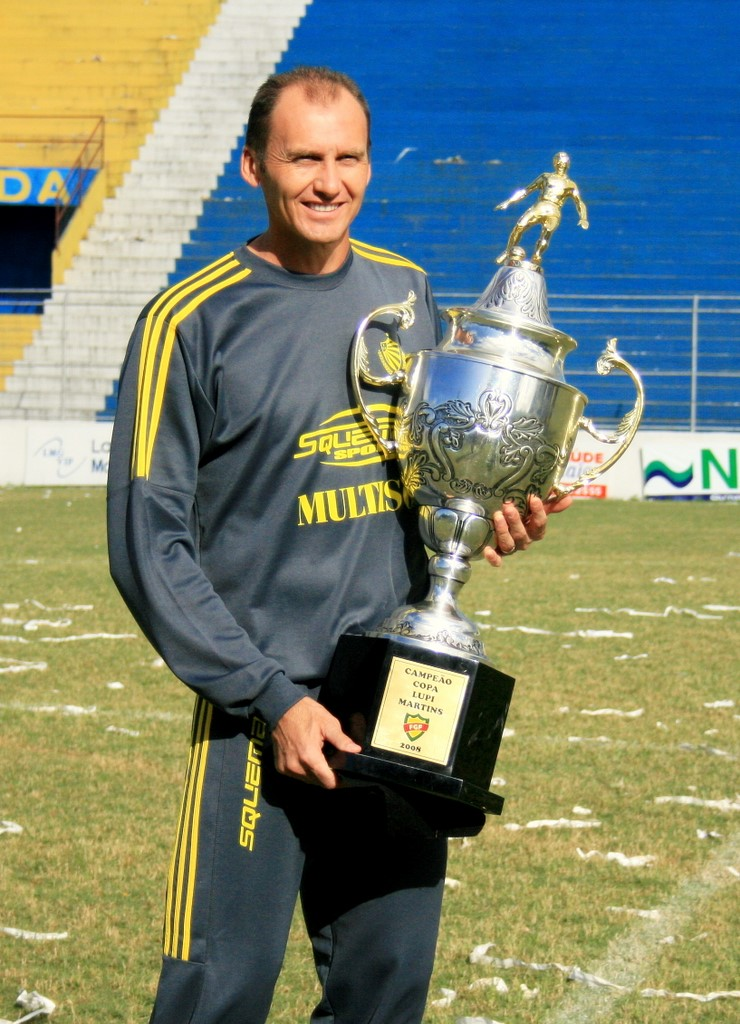 Técnico Gilmar Dal Pozzo ESPORTE CLUBE PELOTAS CAMPEÃO DA COPA FGF 2008 (Lupi Martins)